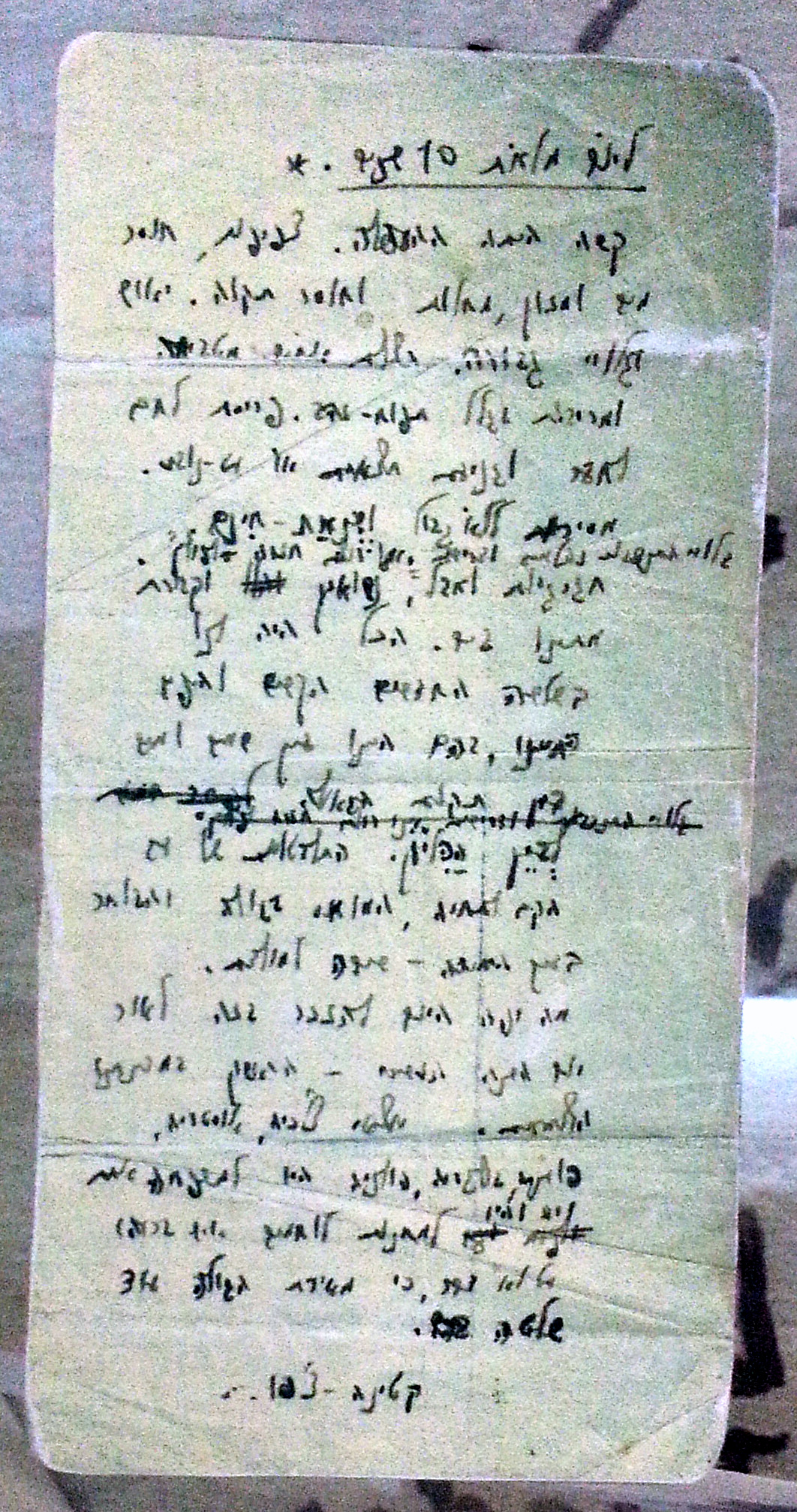 דברי דר. זליק פאול מפקד אוניית המעפילים קאטינה ב-1949 באירוע לכבוד עשור להפלגה. מוצג בתערוכת קבע בתצוגת "אף על פי" במכון ז'בוטינסקי בתל אביב